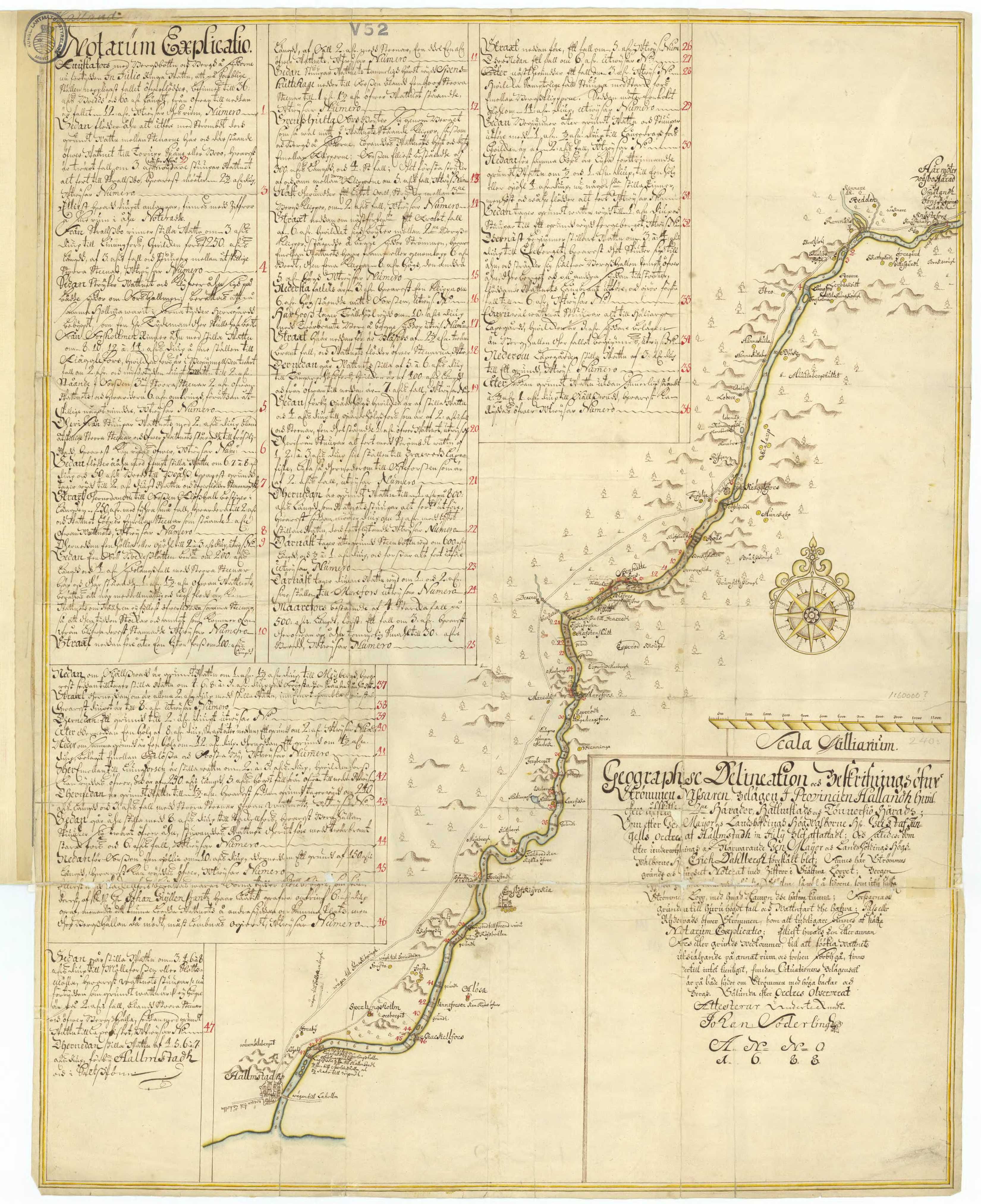 Gammal karta över Nissan från Väsbo härad till Östersjön.